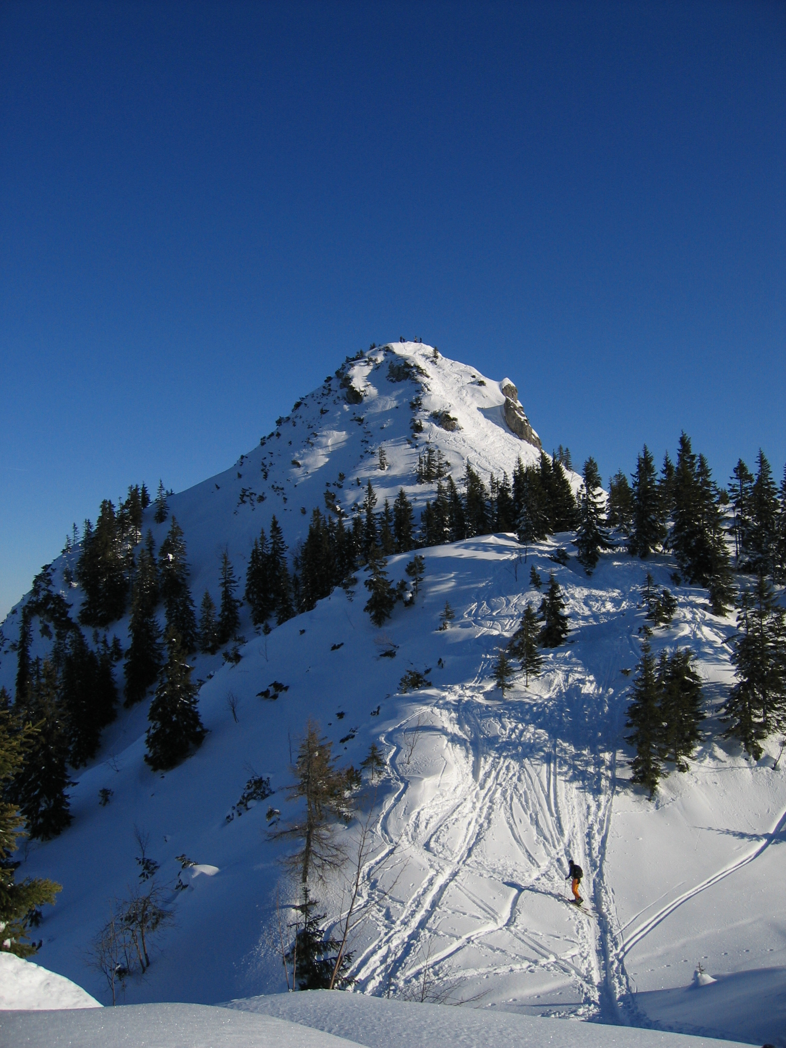 Bavarian mountain "Schildenstein".